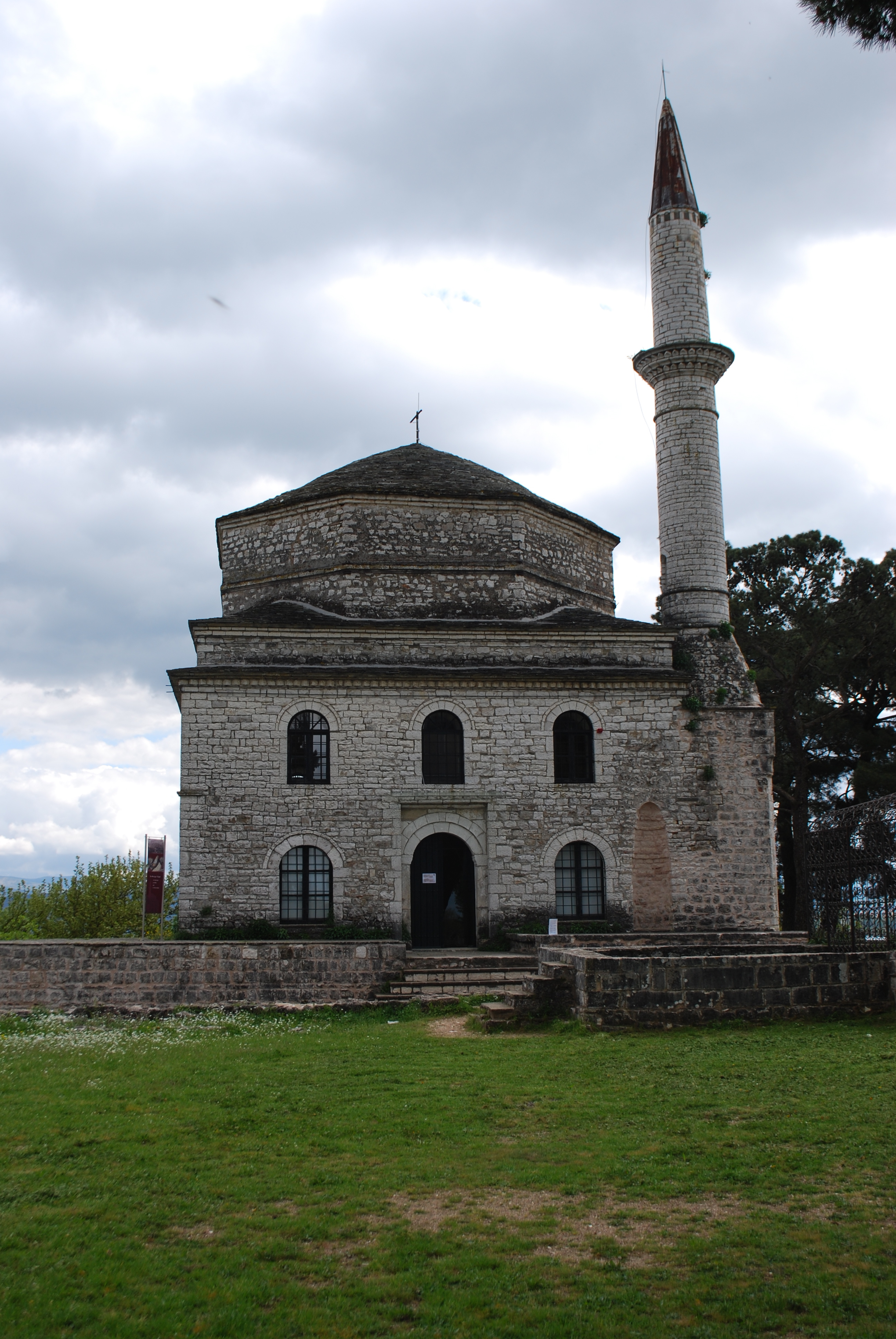 Vue de Ioannina.